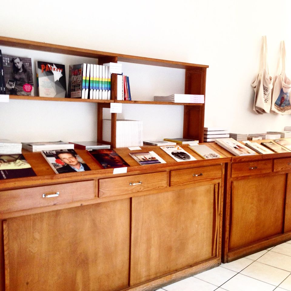 La Galerie - Librairie d'Art du FILAF propose une sélection de revues sur l'art dont Artpress, The Drawer, The British Journal of Photography ou encore Eikon